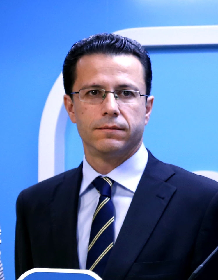 Lasquetty 2014